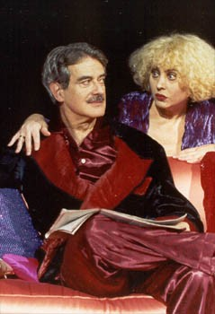 Foto di scena dello spettacolo "Vite Private", con Giuseppe Pambieri, da me scattata a Milano nel febbraio 2003.